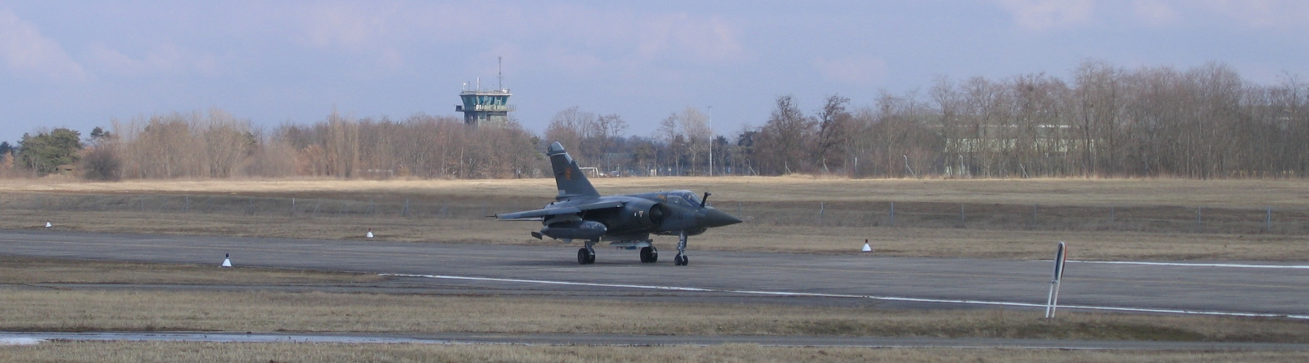 Mirage F1-CT atterrissant sur la base aérienne 132, en France.